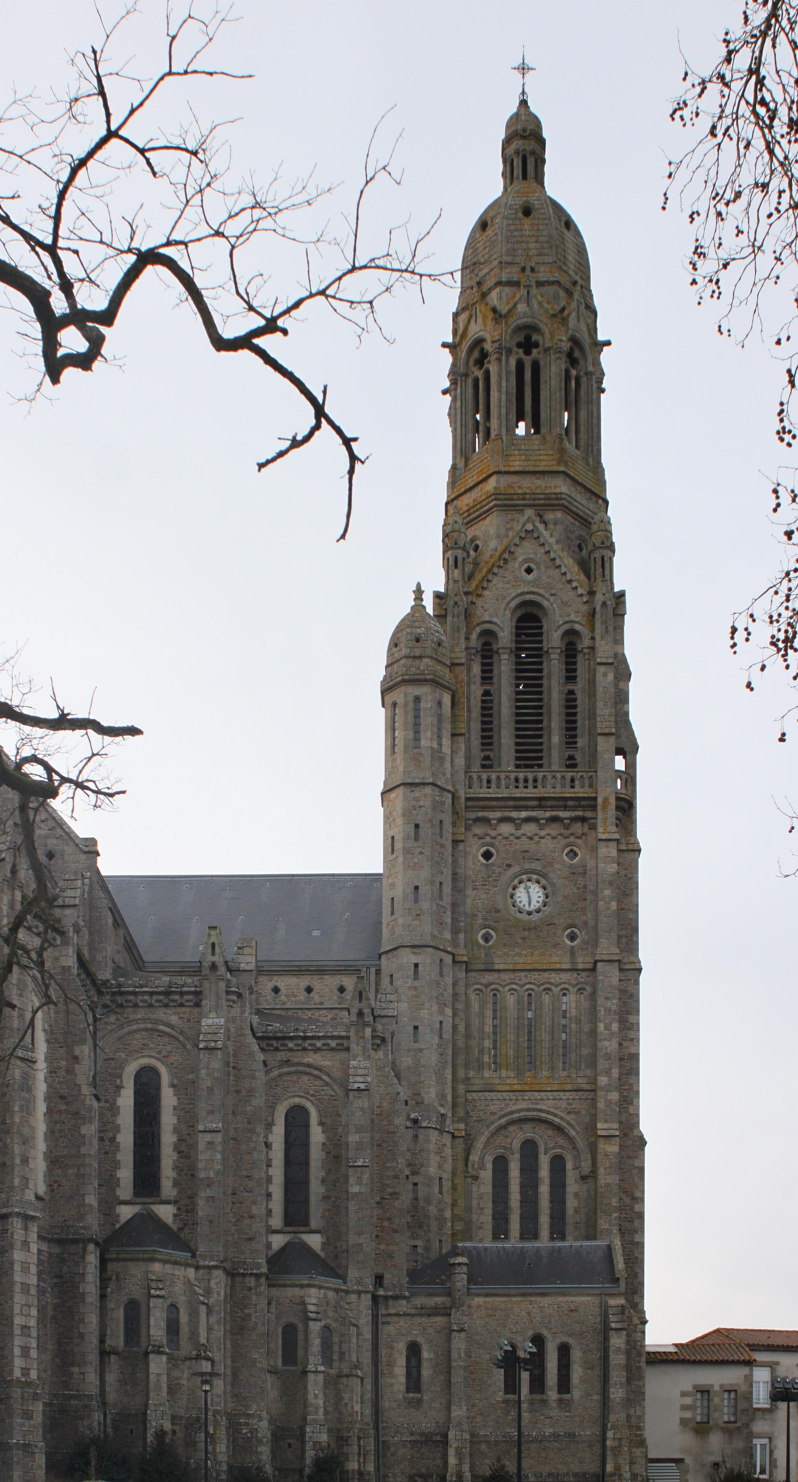 Église Saint-Laurent, Fr-85-Saint-Laurent-sur-Sèvre.